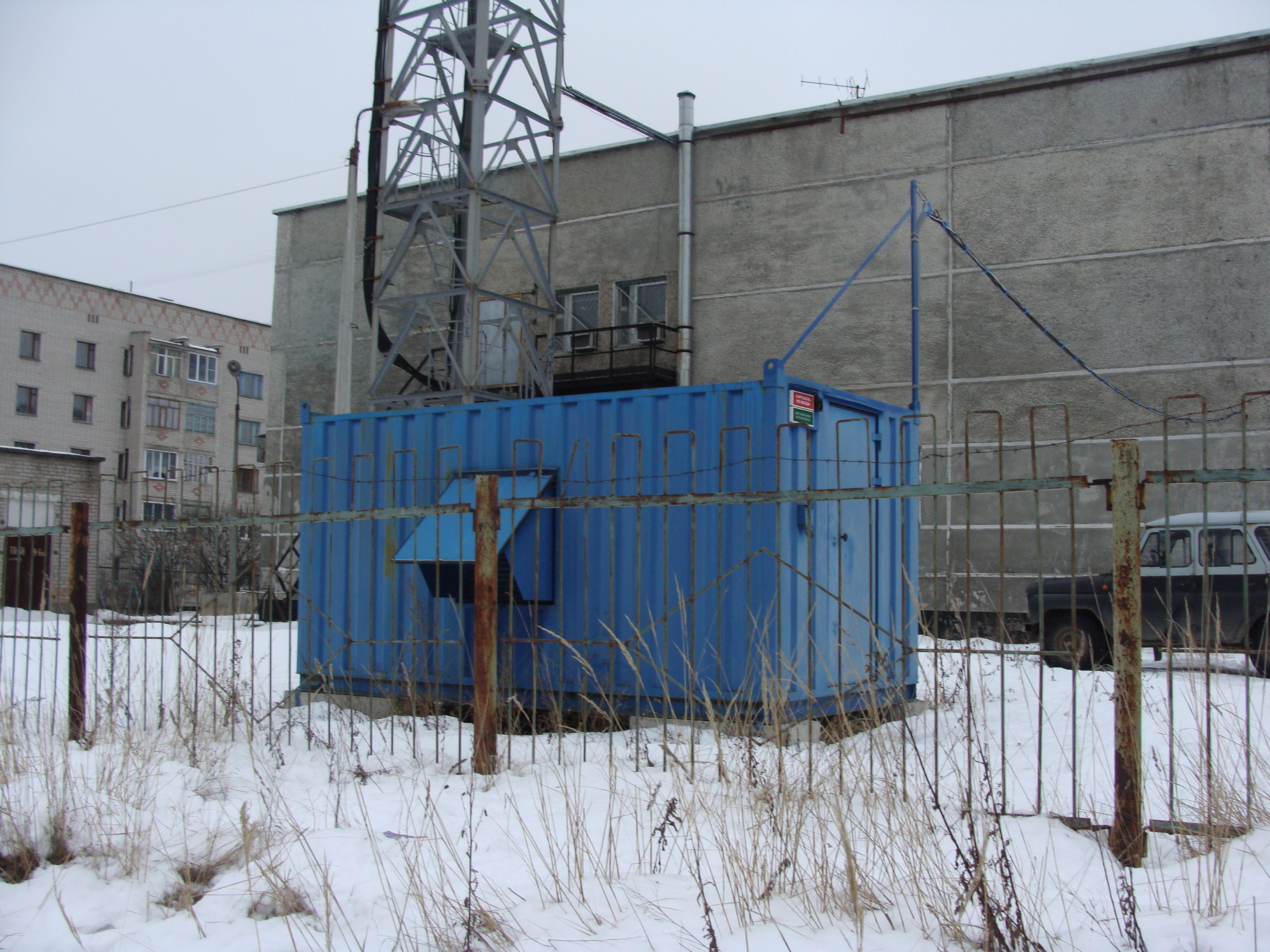 Дизель-генератор у телефонной станции, Коряжма